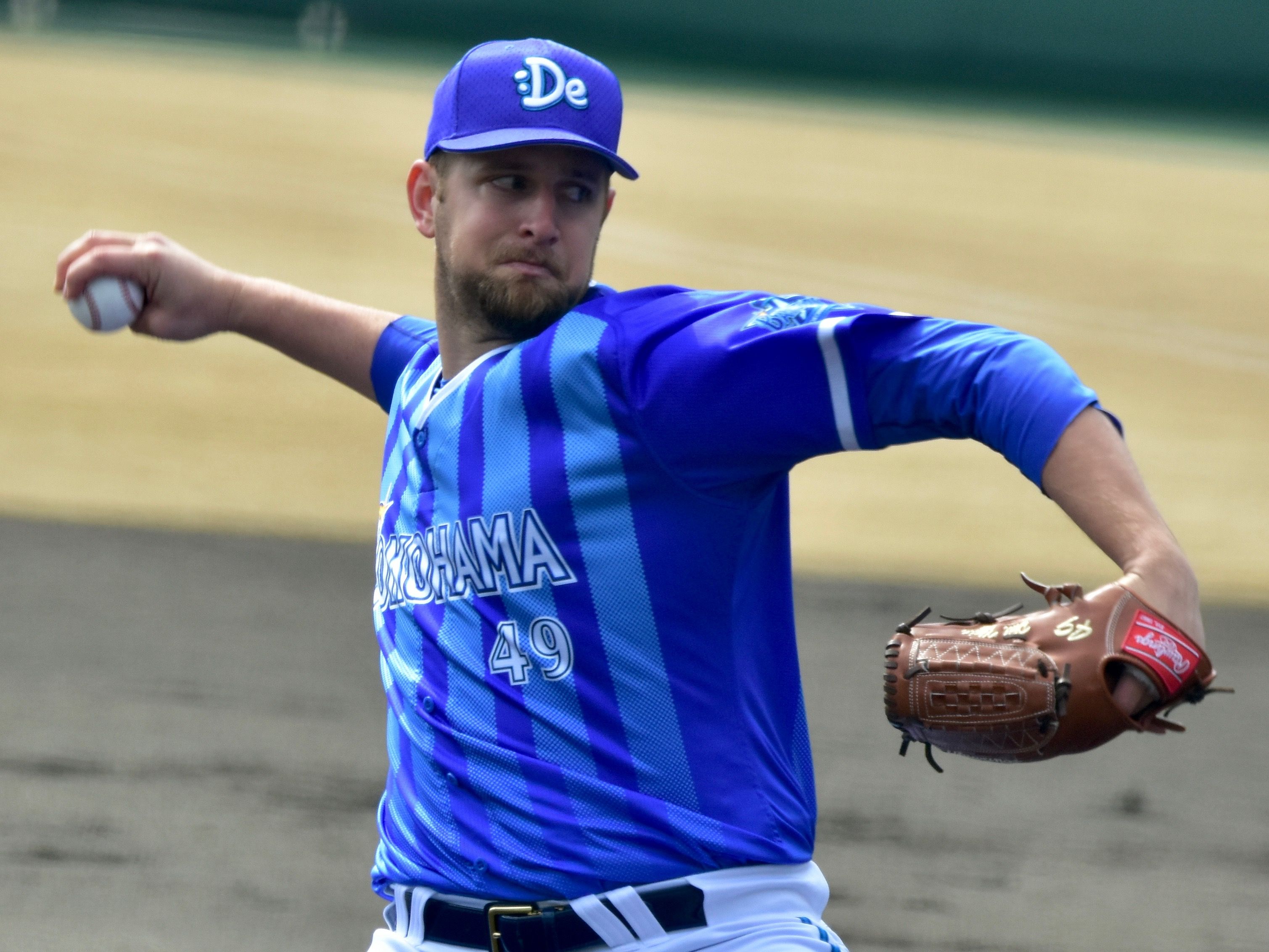 倉敷マスカットスタジアムにて at Kurashiki Muscat Stadium, Yokohama DeNA Baystars(NPB)